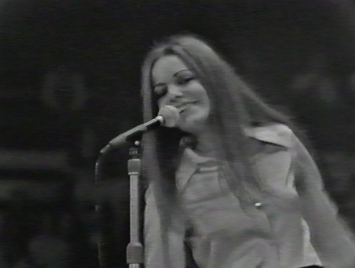 Nada durante un'esibizione a Torino nel 1970